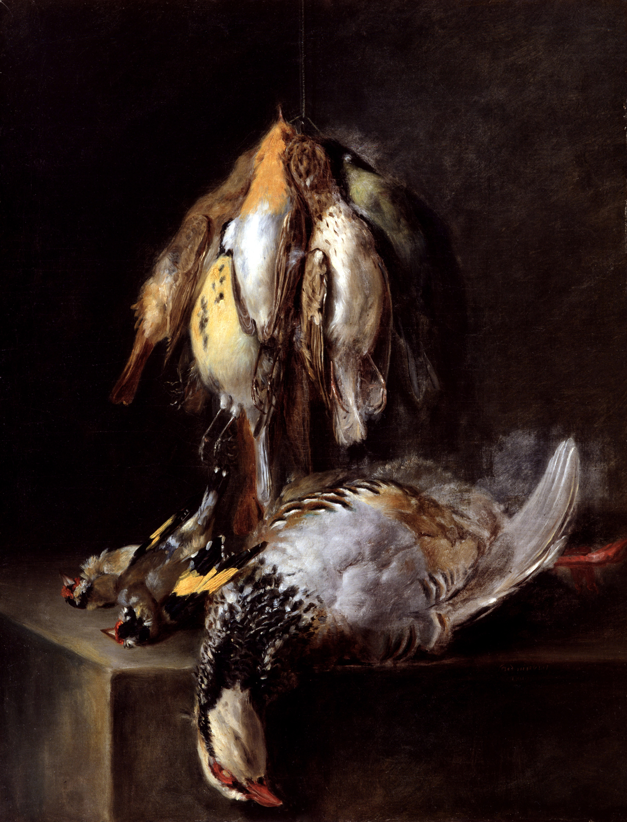 Peinture à l'huile du XIXe siècle, par le peintre et miniaturiste français Etienne-Louis Advinent.